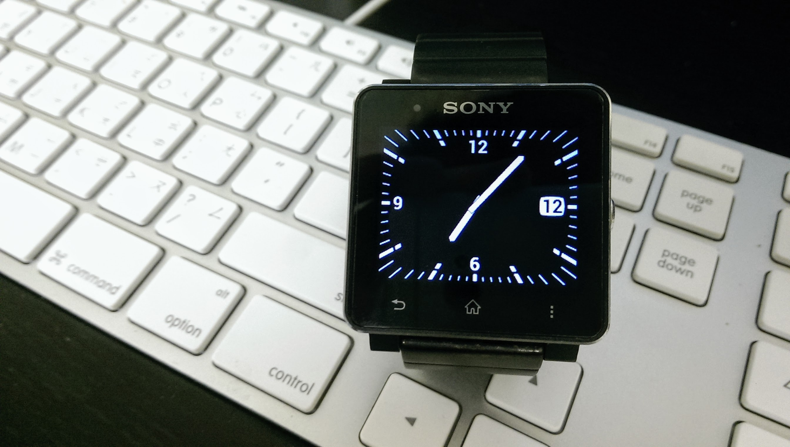 SONY 所推出的智慧型手錶（非 Android Wear 系統）：SmartWatch 2。